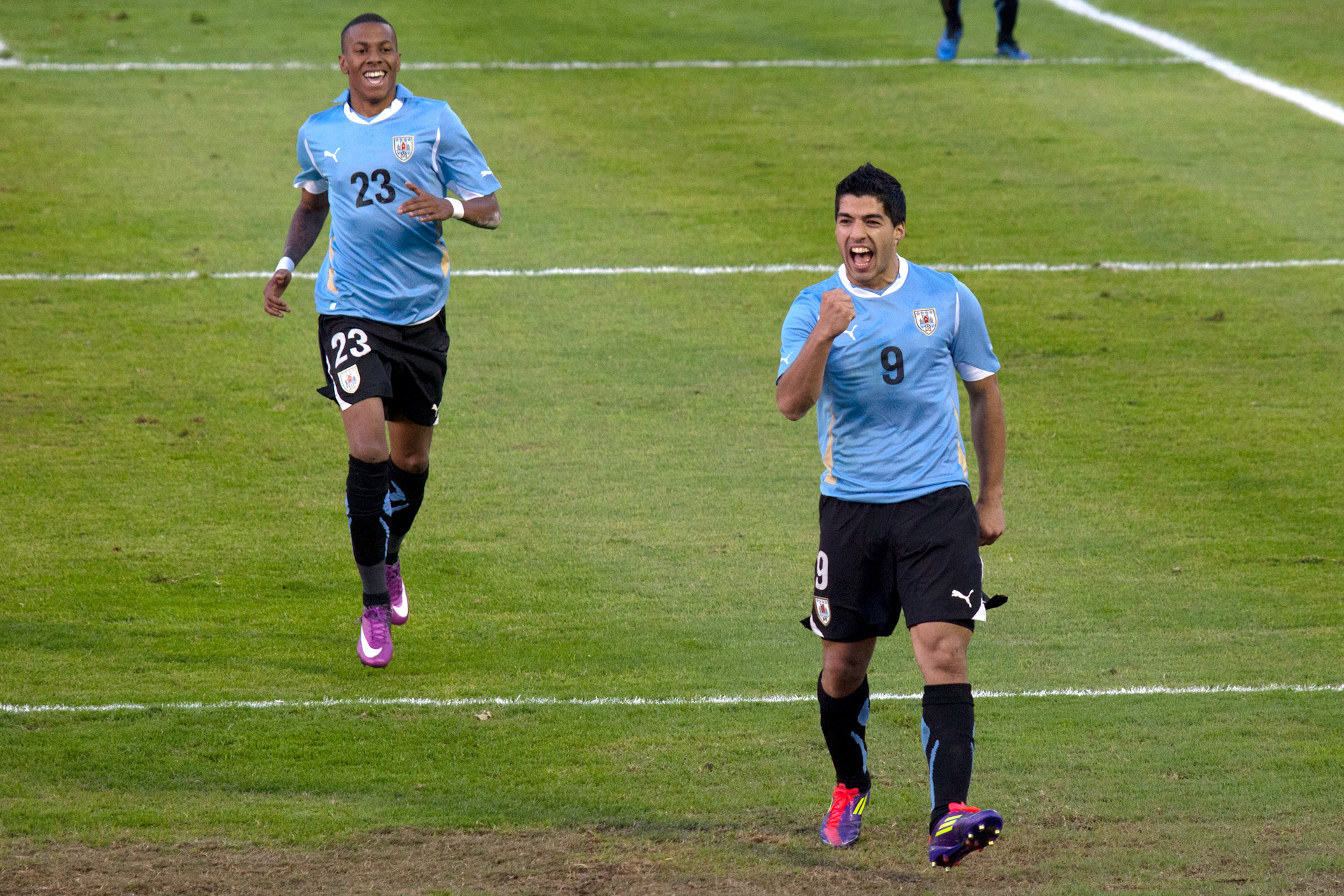 Luis Suárez